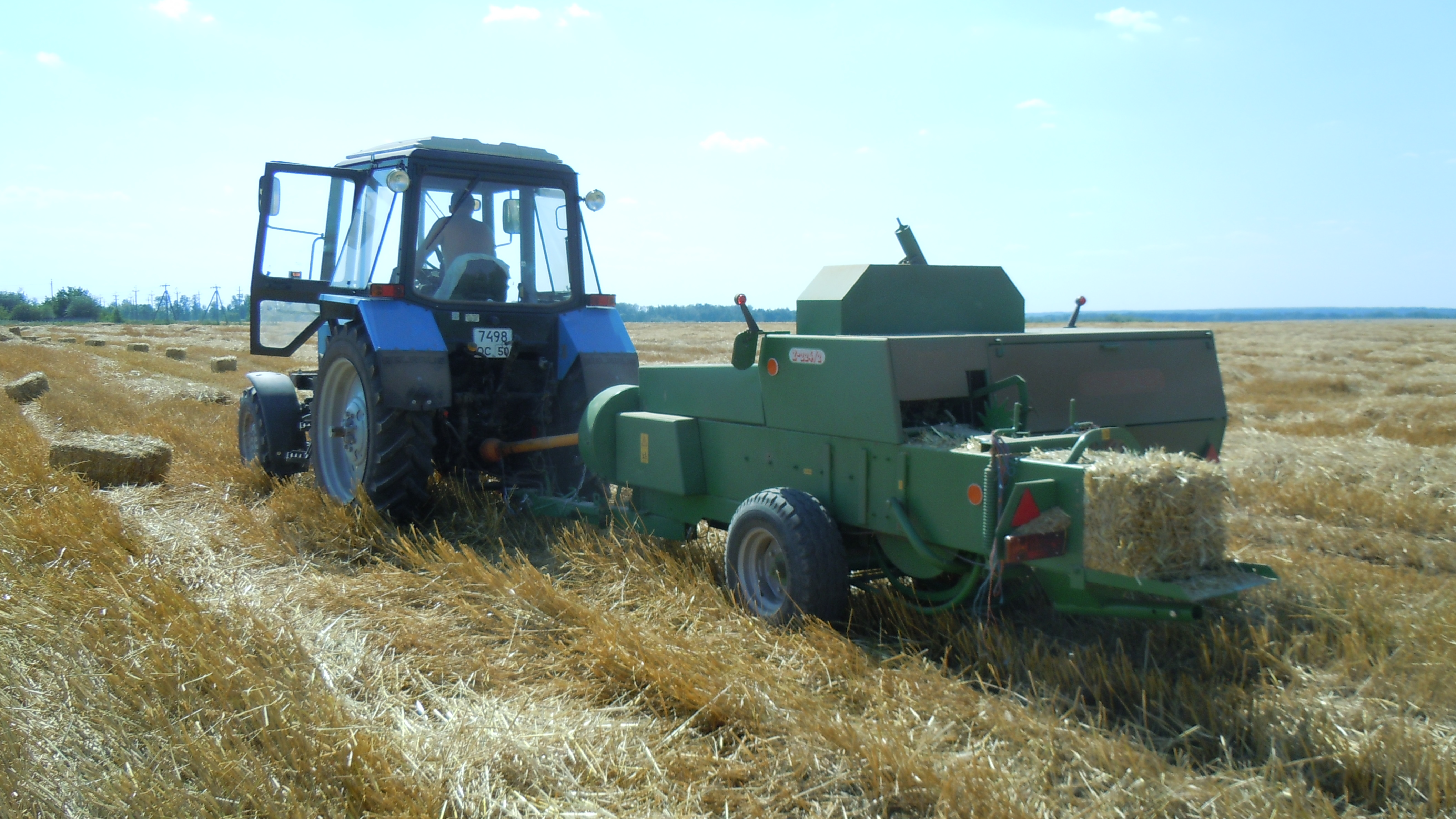 Работа прес-подюорщика на поле. Прессовка соломенных блоков для строительства.